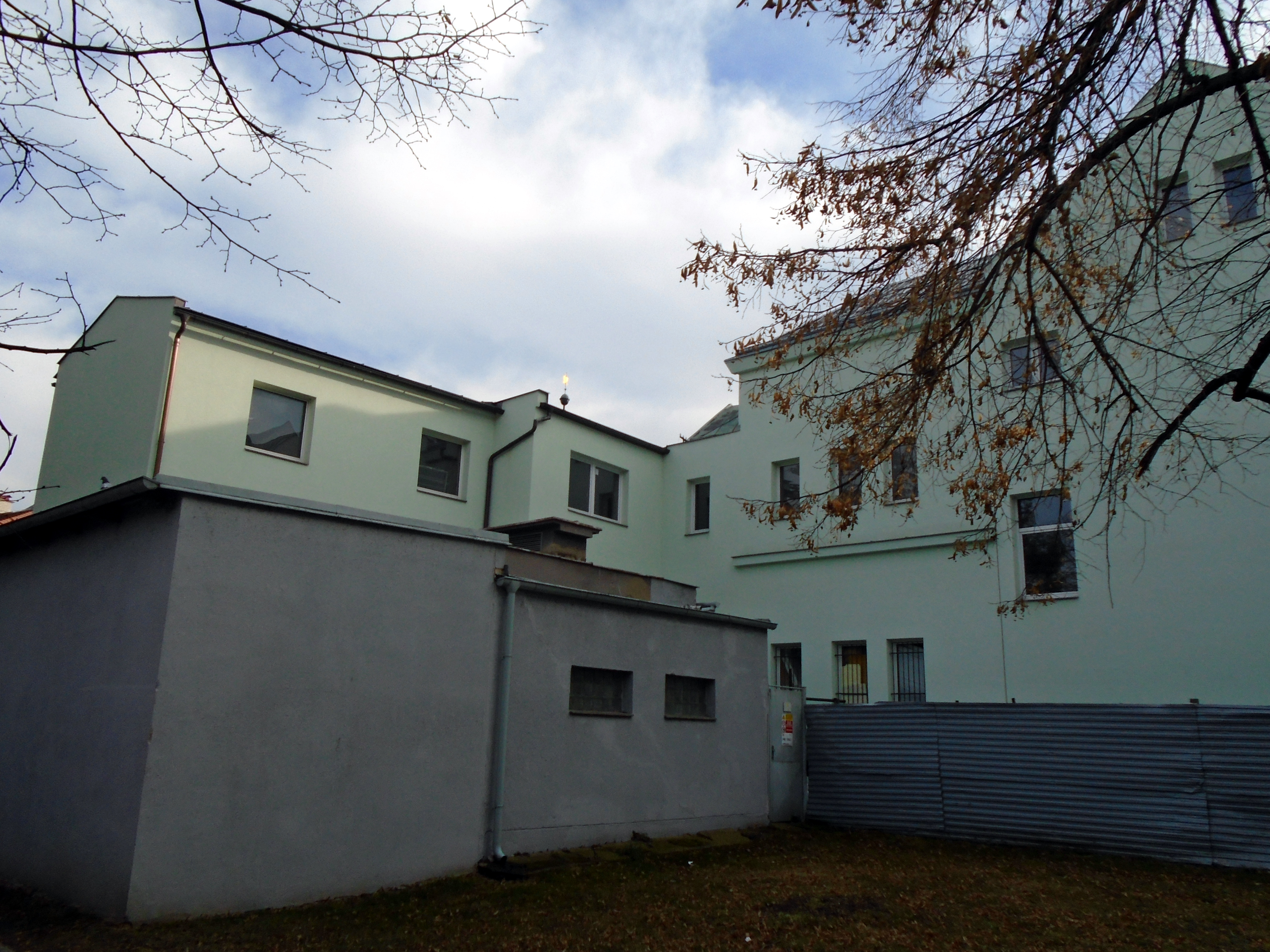 Zadní trakt budovy záložny. Část vlevo je novodobá přístavba.